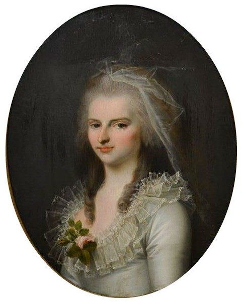 Графиня Прасковья Александровна Зубова, ур. Вяземская (1772-1835)